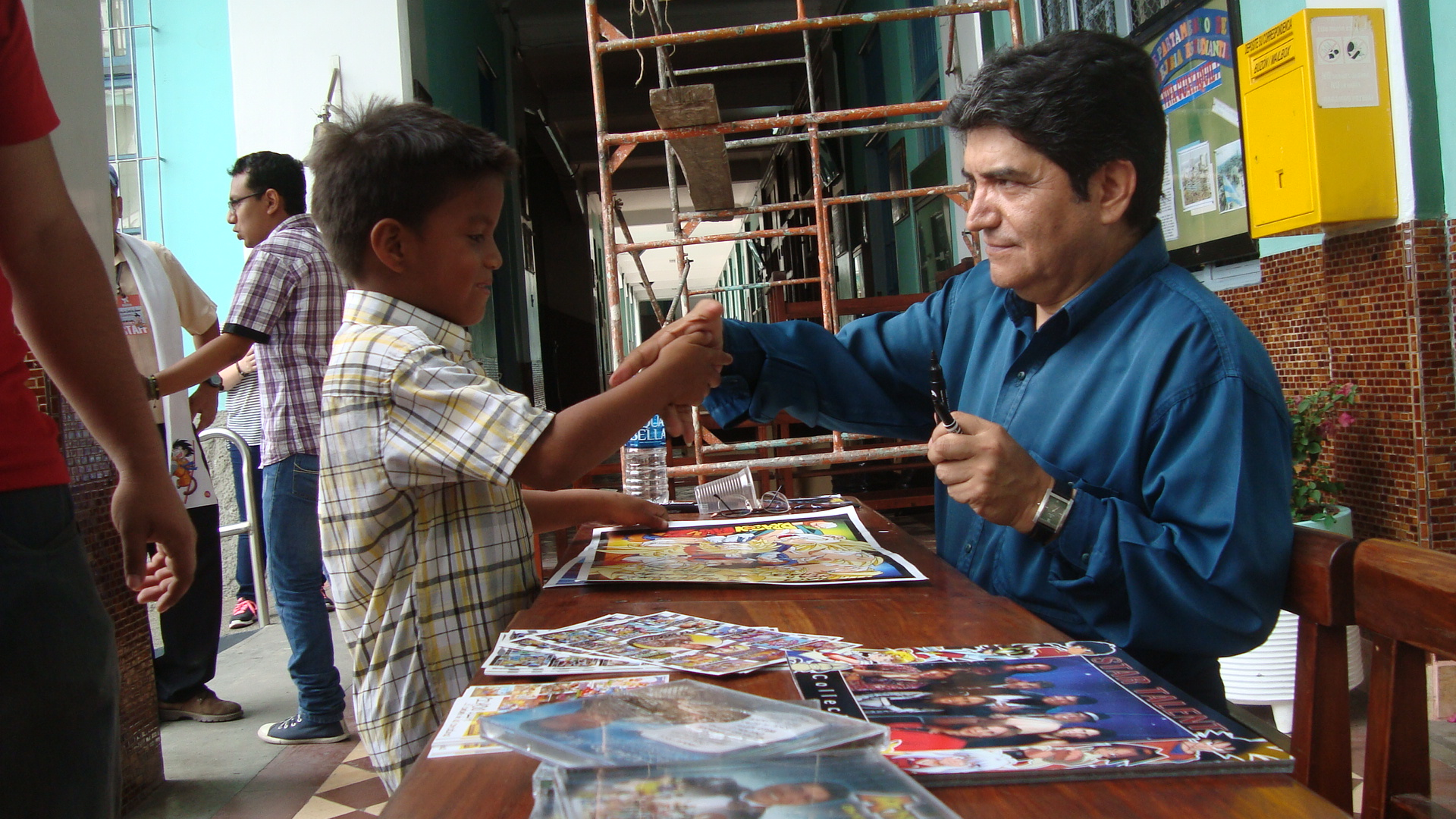 Ricardo Silva firmando autógrafos en Guayaquil en 2014